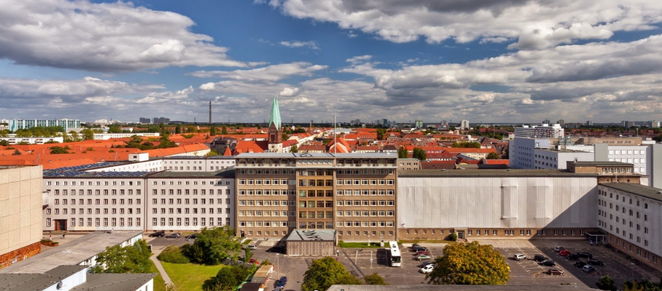 Haus 1 der ehemaligen Zentrale des Ministeriums für Staatssicherheit (MfS) der DDR